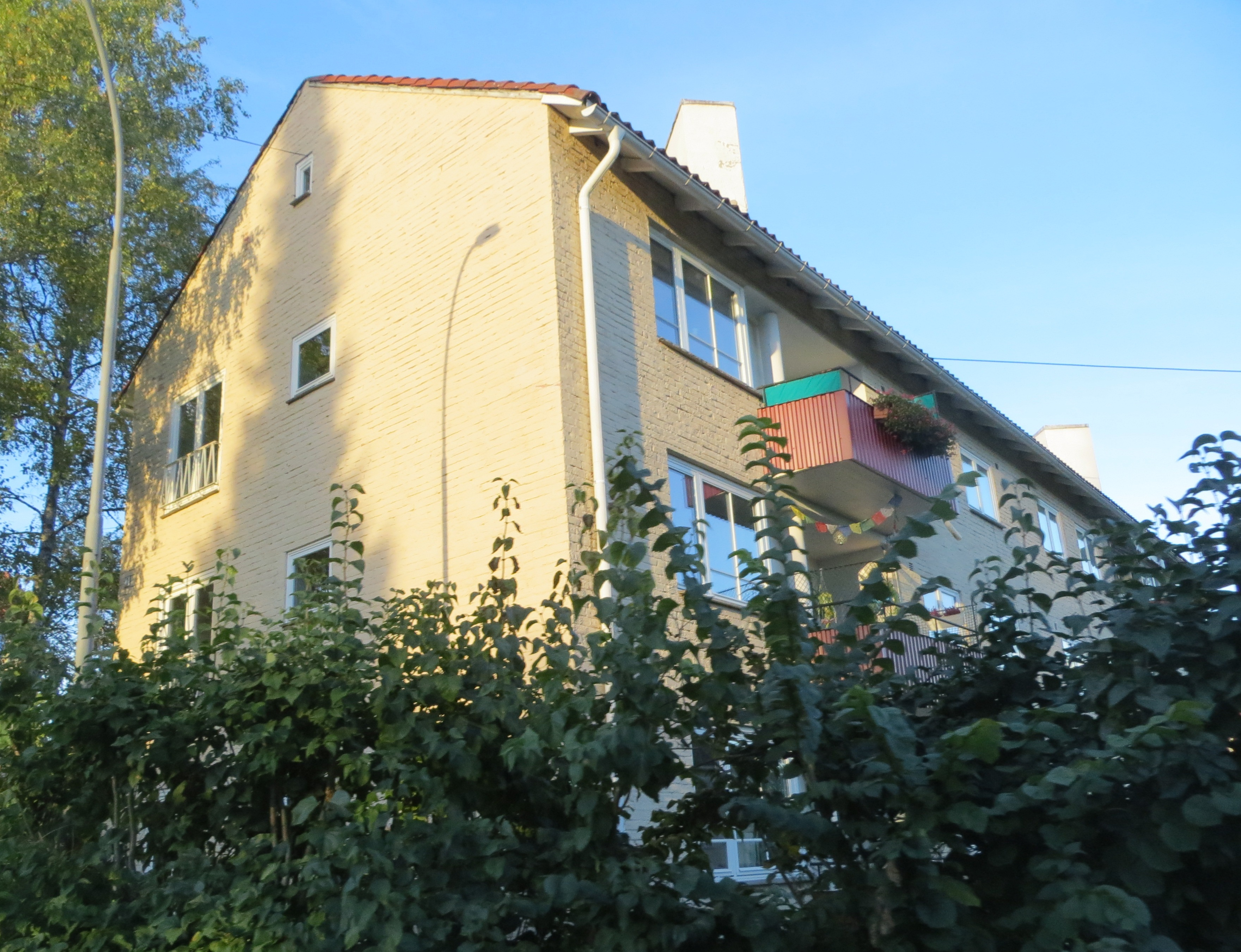 Flyveien, Luftfartsveien og Landingsveien har et sammenhengende, funksjonalistisk blokkmiljø omkring "Snippen", med kommunalt listeført bygningsvern. Hovseter i bydel Vestre Aker, Oslo.